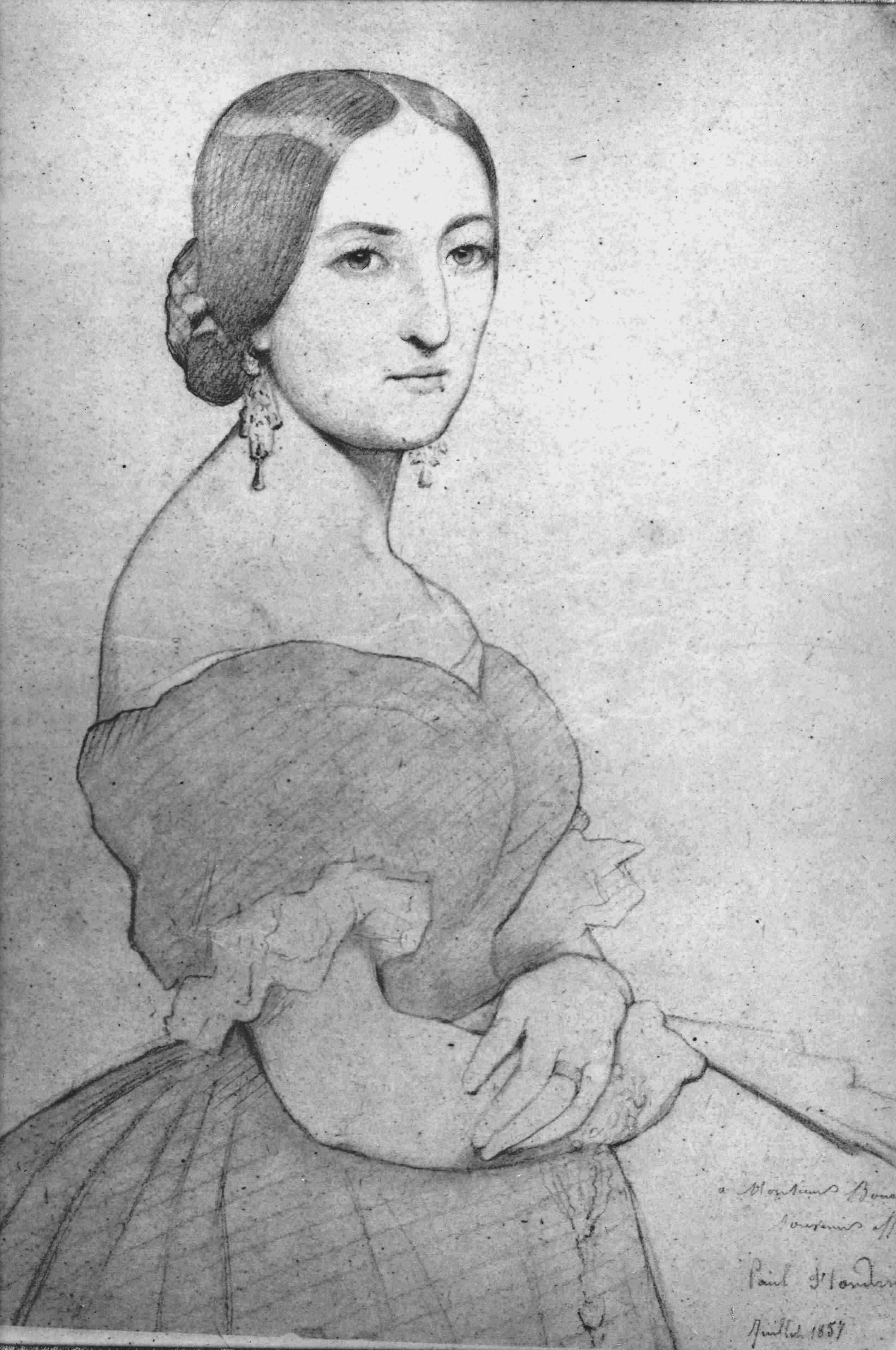 Portrait de Mme Bouchot née Camp de Pedros, 1857 par Paul Jean Flandrin